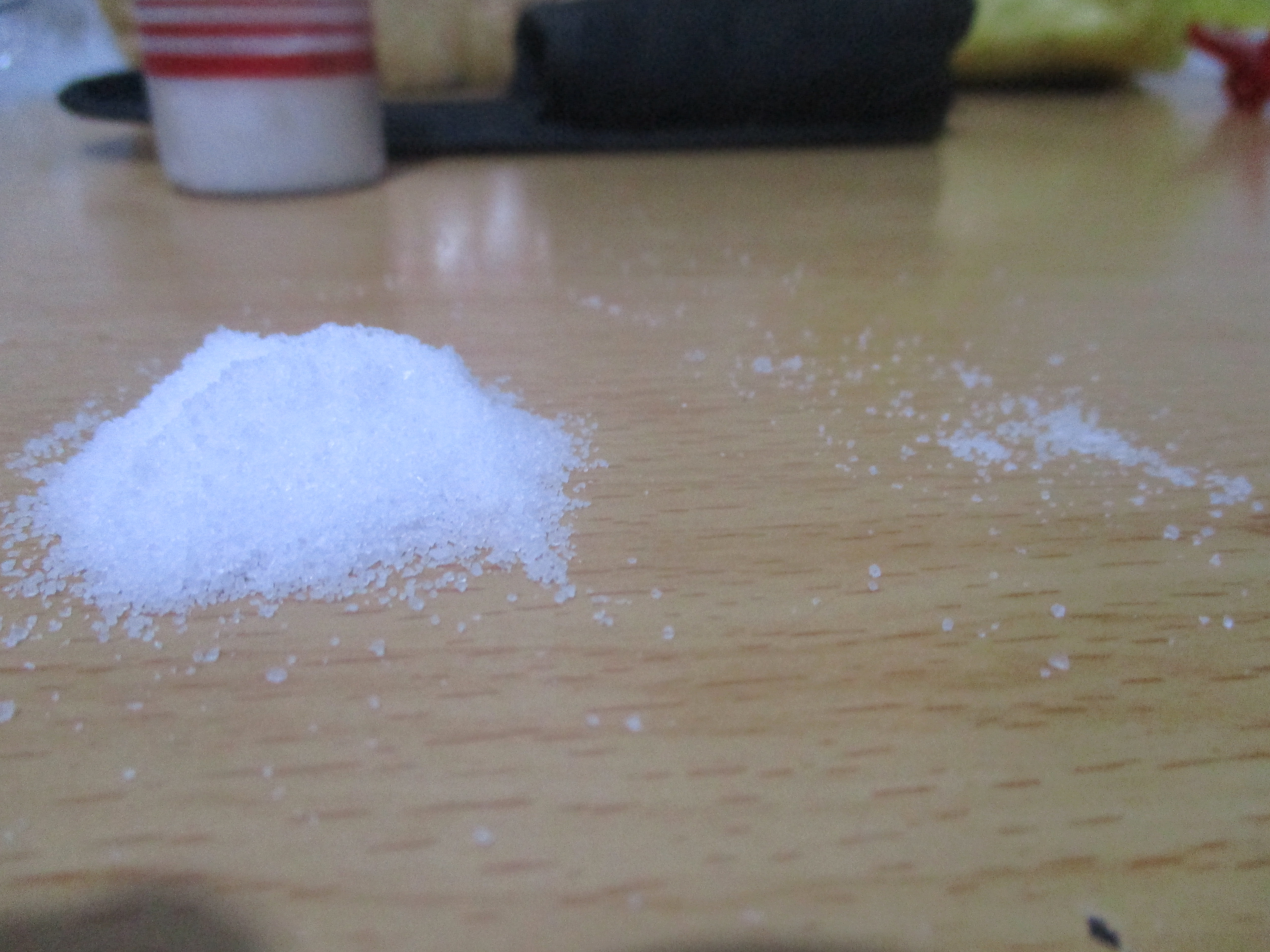 מצבור גרגרים, וערימה